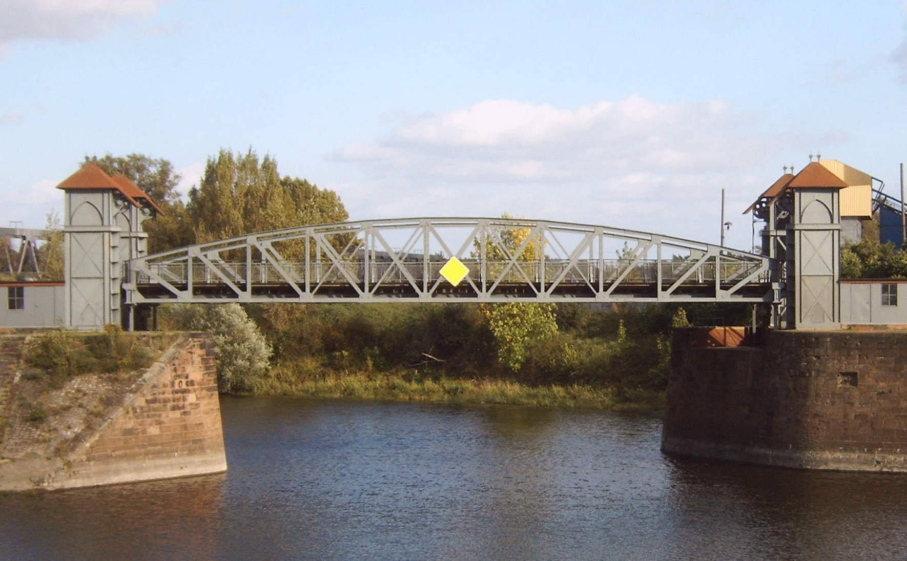 Hubbrücke im Handelshafen Magdeburg, Sachsen-Anhalt, Deutschland, Blick auf die Westseite